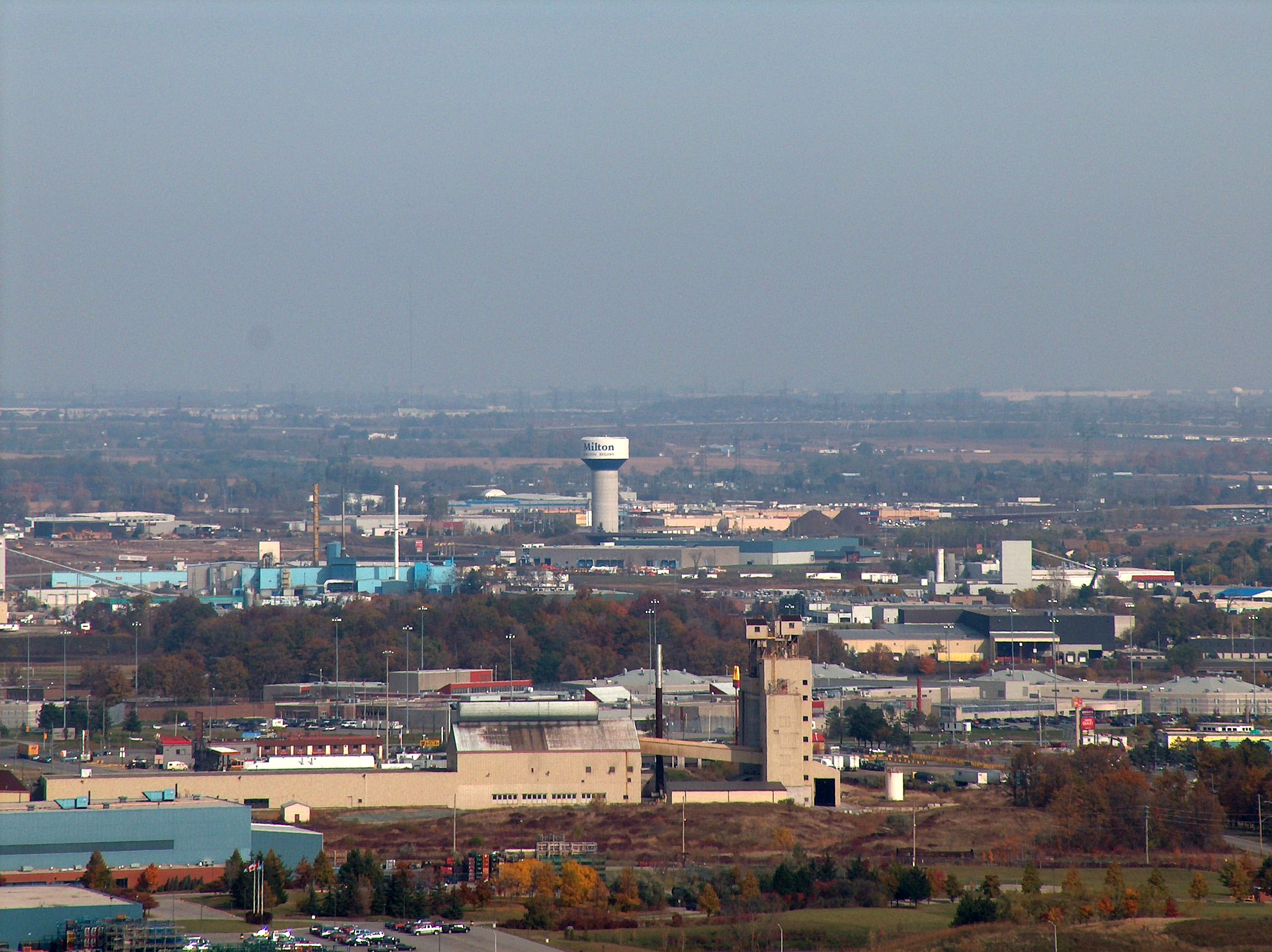 Milton, Ontario